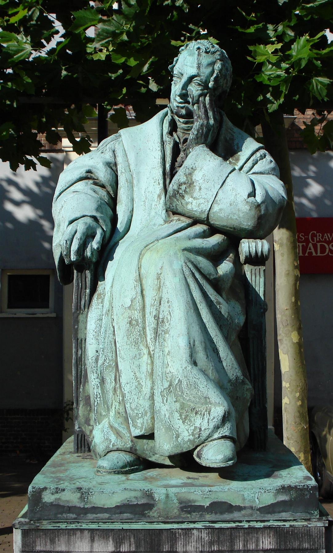 Den Haag, Kazernestraat. Kunstwerk "Joan Melchior Kemper" van Oswald Wenckebach. The Hague/The Netherlands.